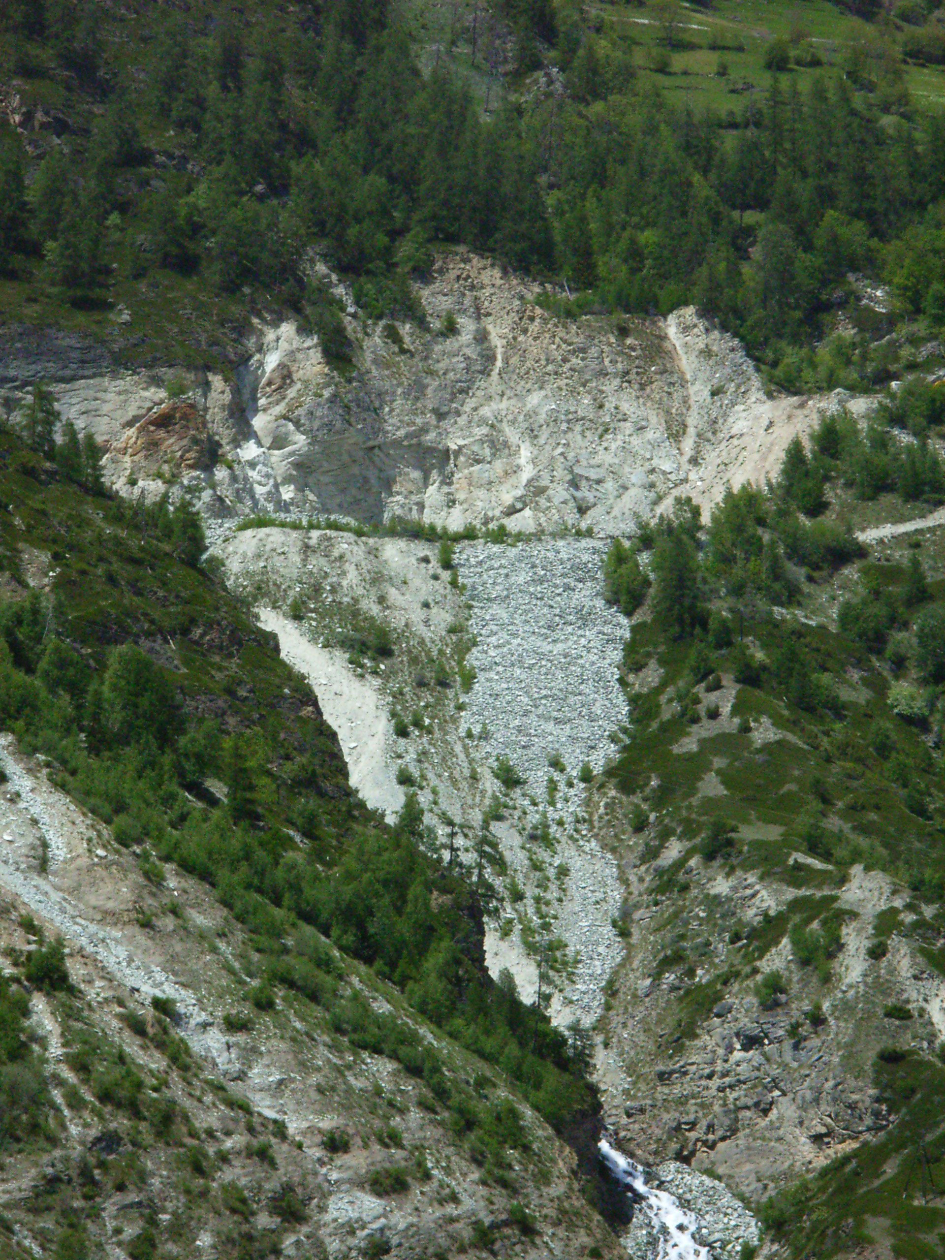 Quarzitsteinbruch bei Embd (Bezirk Visp, Kanton Wallis, Schweiz), Foto von der talseitigen Verladestation der betriebseigenen Seilbahn